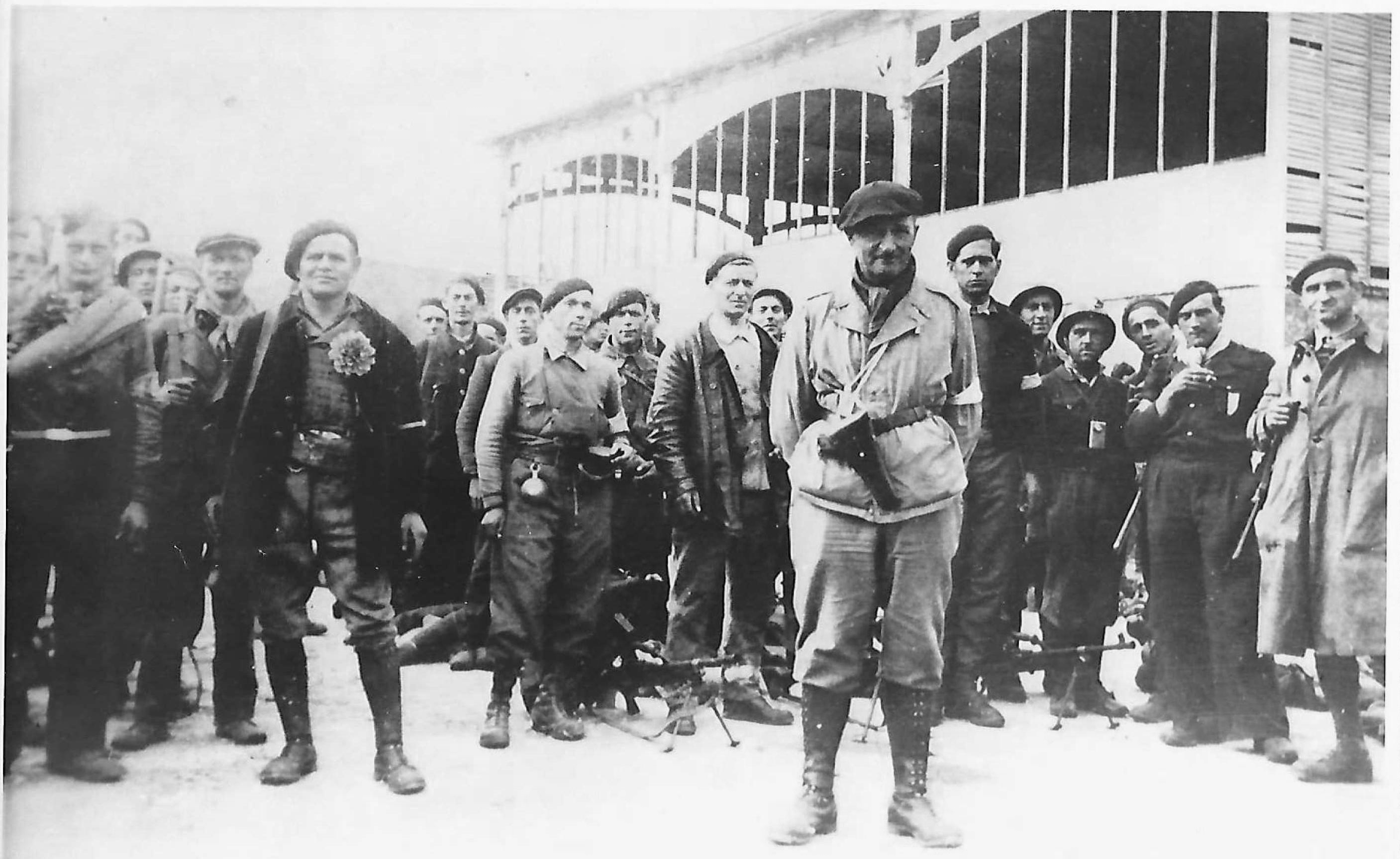 Sous-section 5 du groupe de Recey-sur-Ource